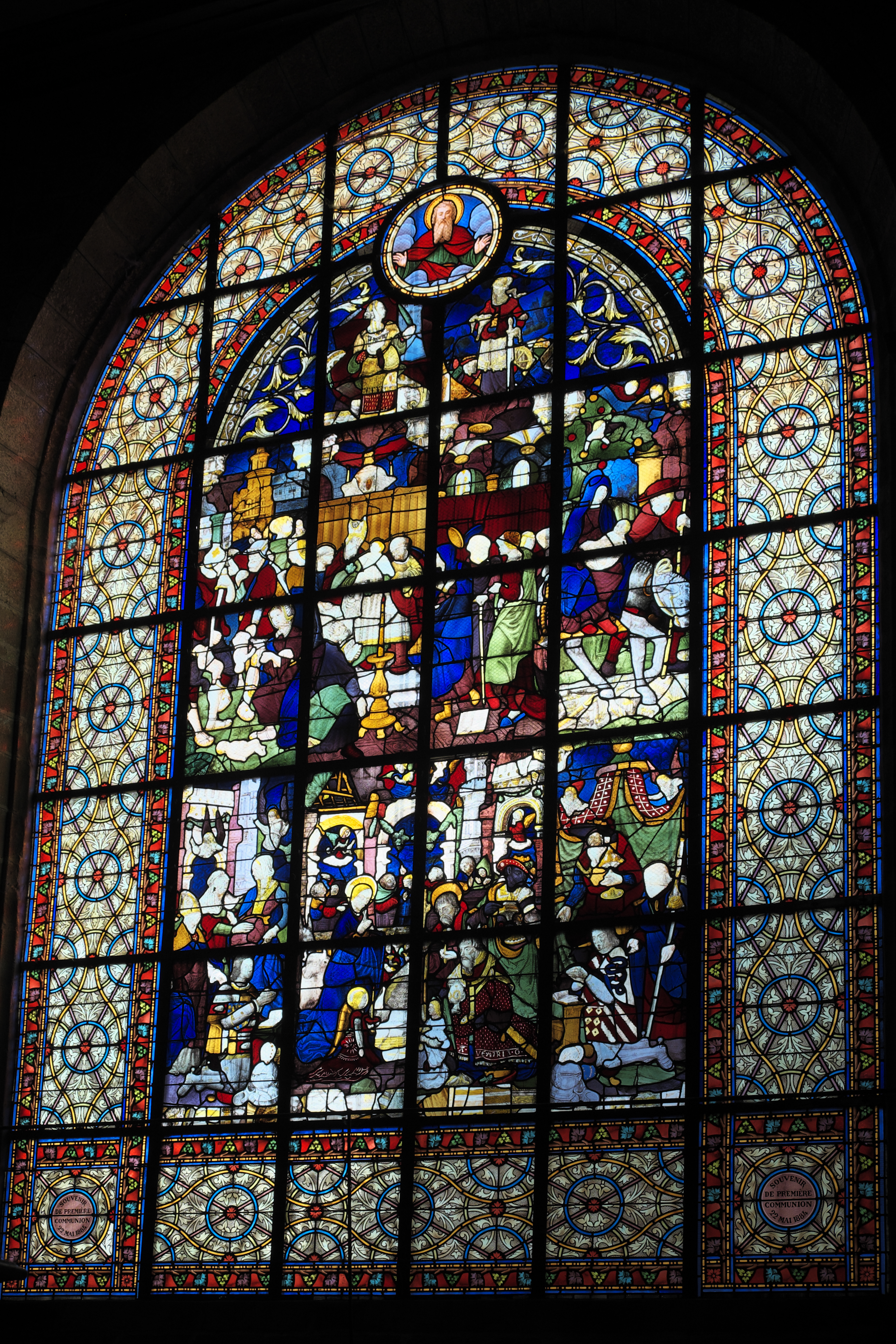 Kindheit Jesu-Fenster (baie 0) in der katholischen Pfarrkirche St-Mathurin in Moncontour im Département Côtes-d’Armor (Region Bretagne/Frankreich), Bleiglasfenster von 1520 bis 1530